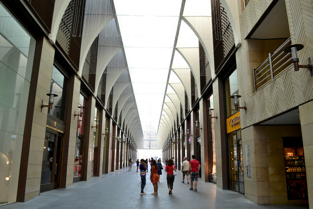 Beirut Souks